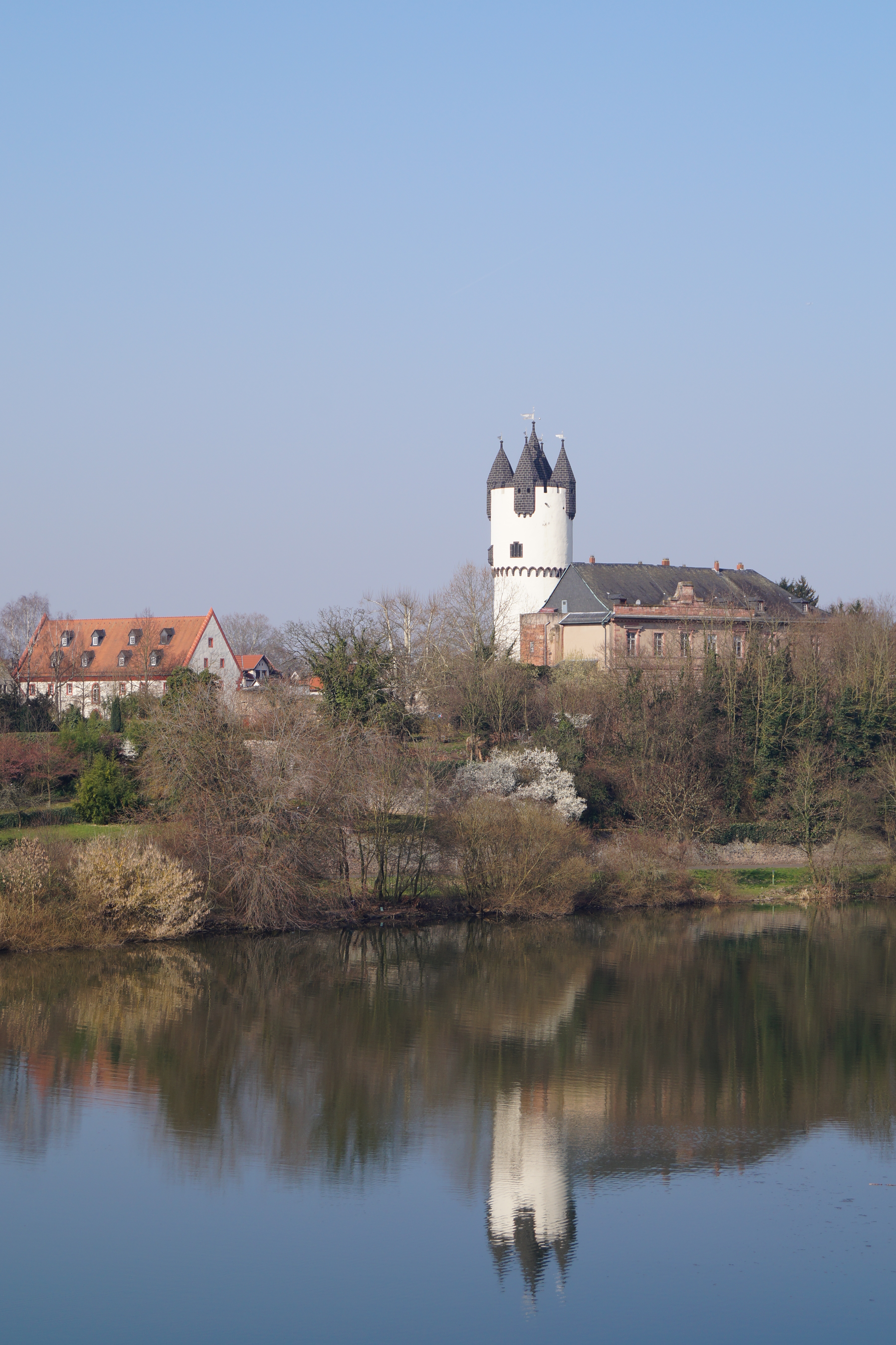 Schloss Steinheim in Hanau-Steinheim, von der Straßenbrücke der B43a fotografiert.